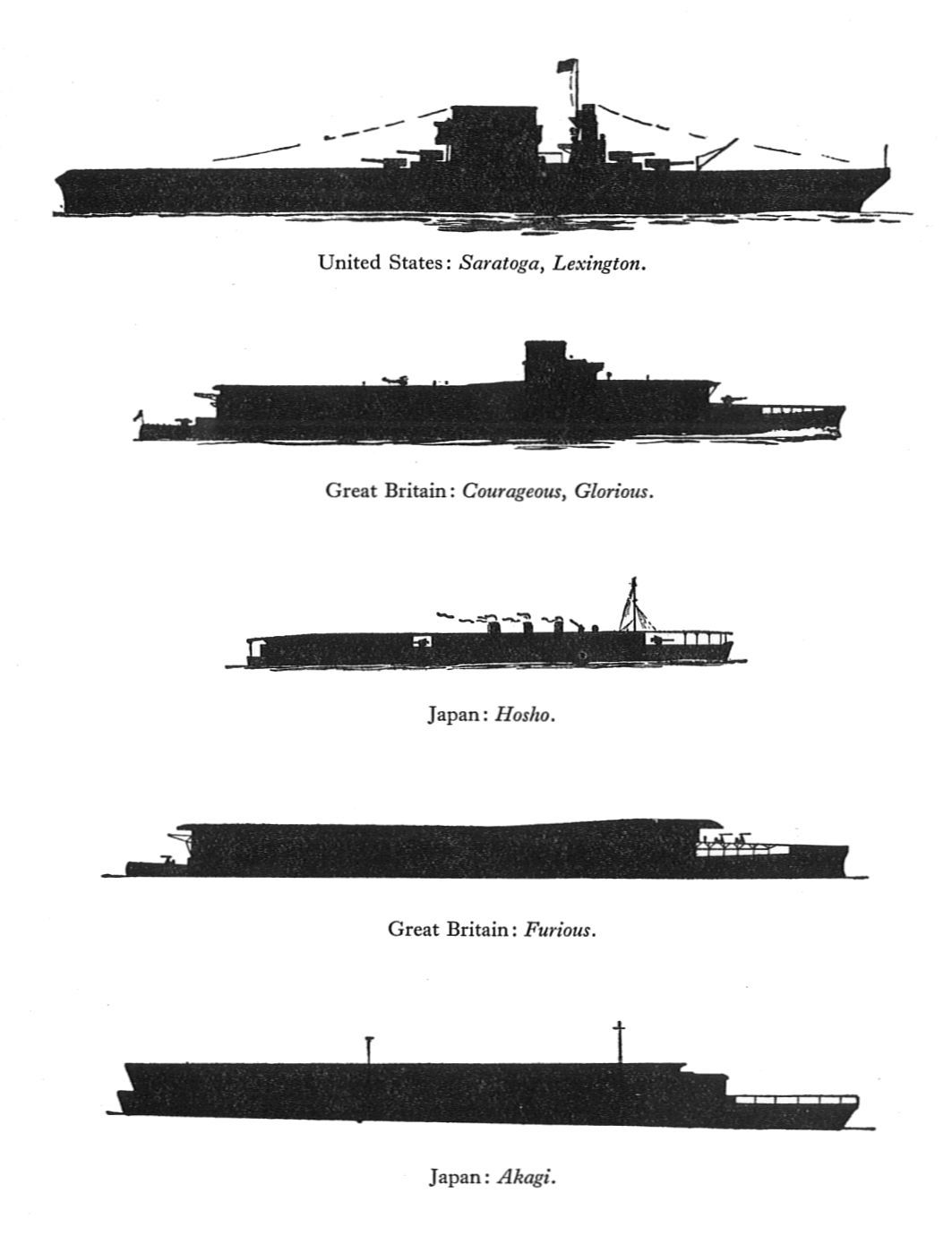 Fig. 5 Aircraft Carriers